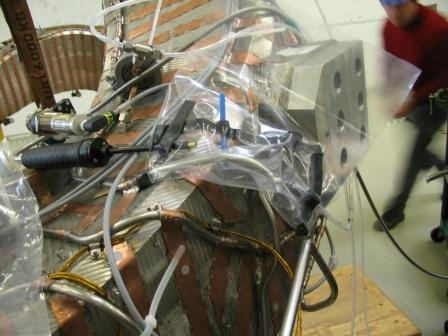 Nachweis der integralen Dichtheit mit dem UST-Verfahren (Aufnahme von einer supraleitenden Spule bei der eine Fluidleitung auf Dichtheit geprüft wurde. )